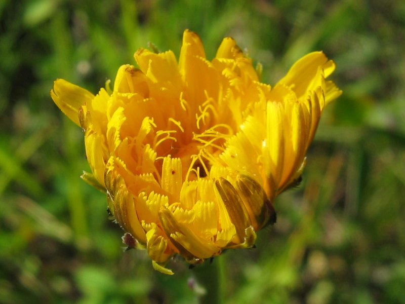 Gewöhnliches Ferkelkraut Hypochaeris radicata, Stoltera Nähe Rostock